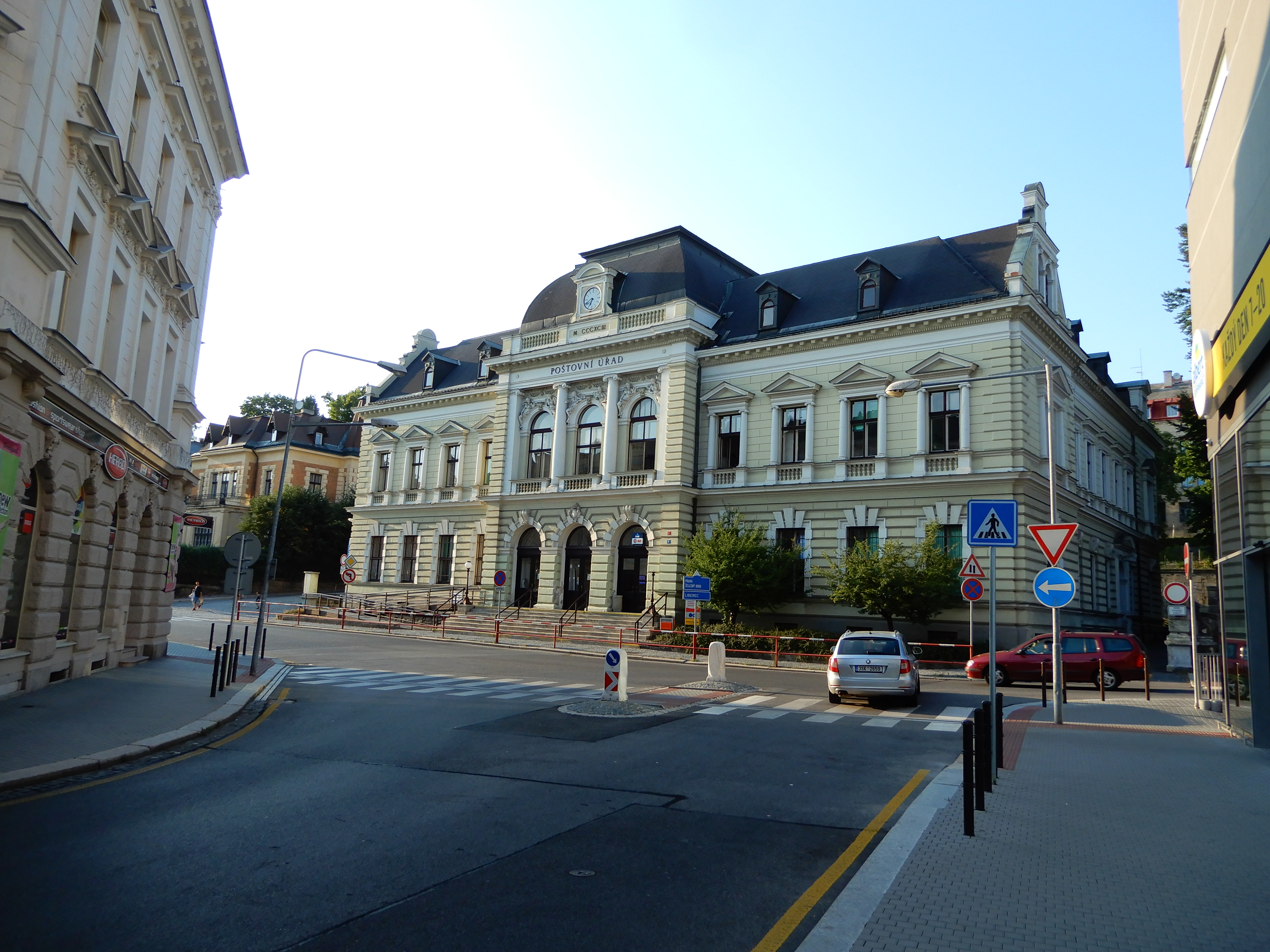 Hlavní poštovní úřad, Jablonec nad Nisou, Liberecká 32/2, stav. Arwed Tharmus, 1896